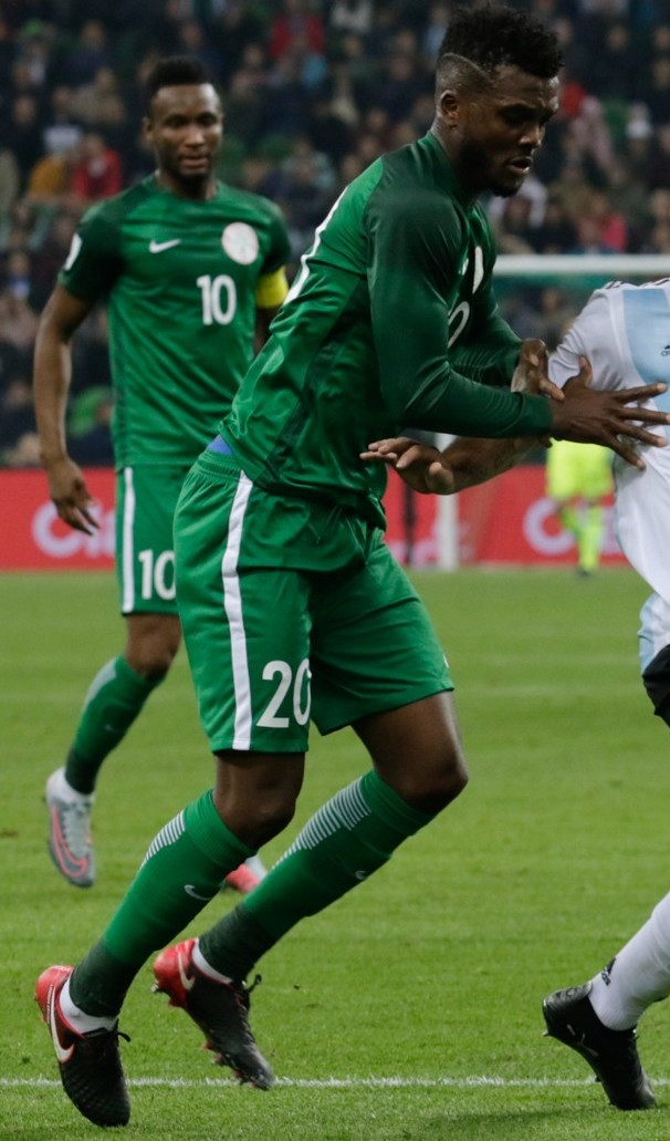 Chidozie Awaziem, Sergio Agüero